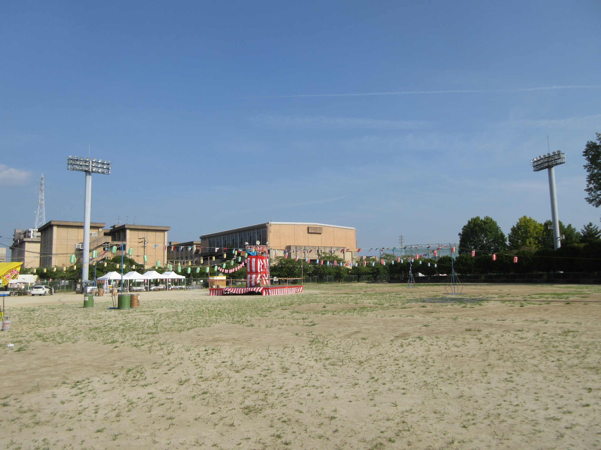 日名公園（岡崎市日名南町）